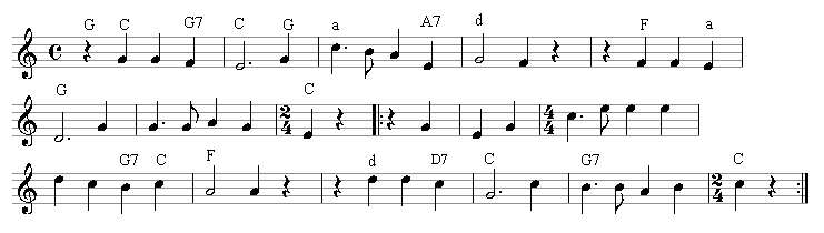 Horst-Wessel-Lied. Die von Horst Wessel zur Untermalung seines Textes verwendete Melodie. Sie stammt aus dem 19. Jahrhundert und unterliegt als solche keinen urheberrechtlichen Beschränkungen, ihre öffentliche Aufführung (auch ohne oder mit verändertem Text) ist laut §86a StGB (Kennzeichen verfassungswidriger Organisationen) in der Bundesrepublik Deutschland jedoch verboten.